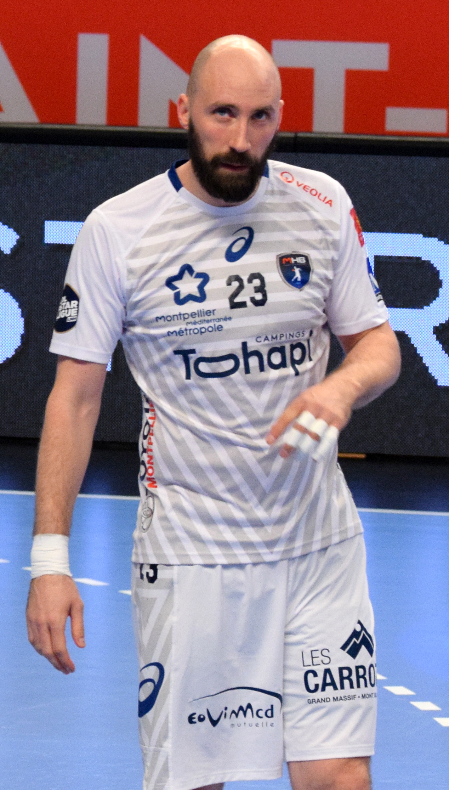 Rencontre de championnat entre le PSG et Montpellier. A Coubertin, le 1er mars 2018.